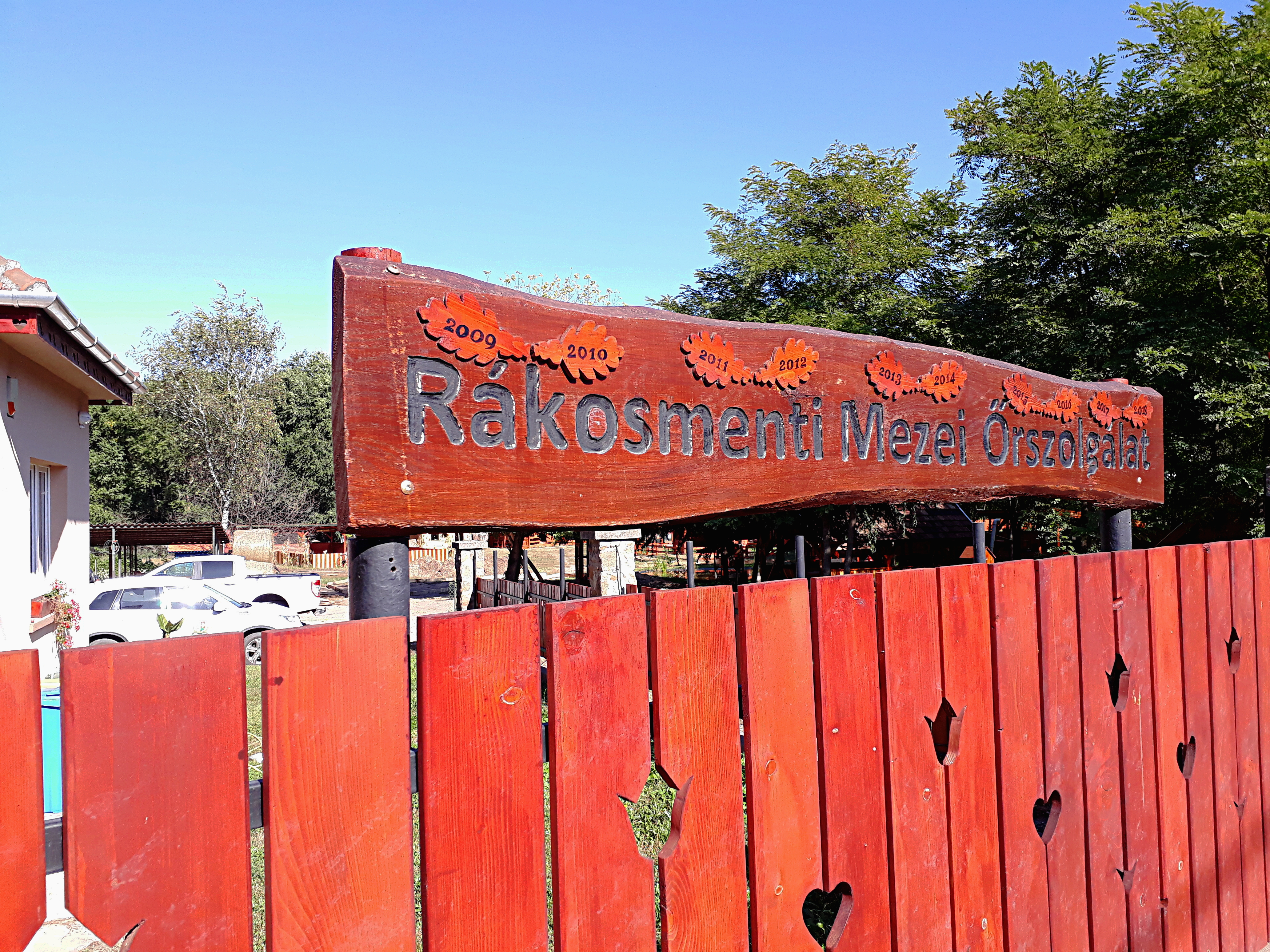 A Rákosmenti Mezei Őrszolgálat Központjának cégtáblája